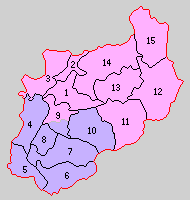 兵庫県加東郡の町村制時点の町村。